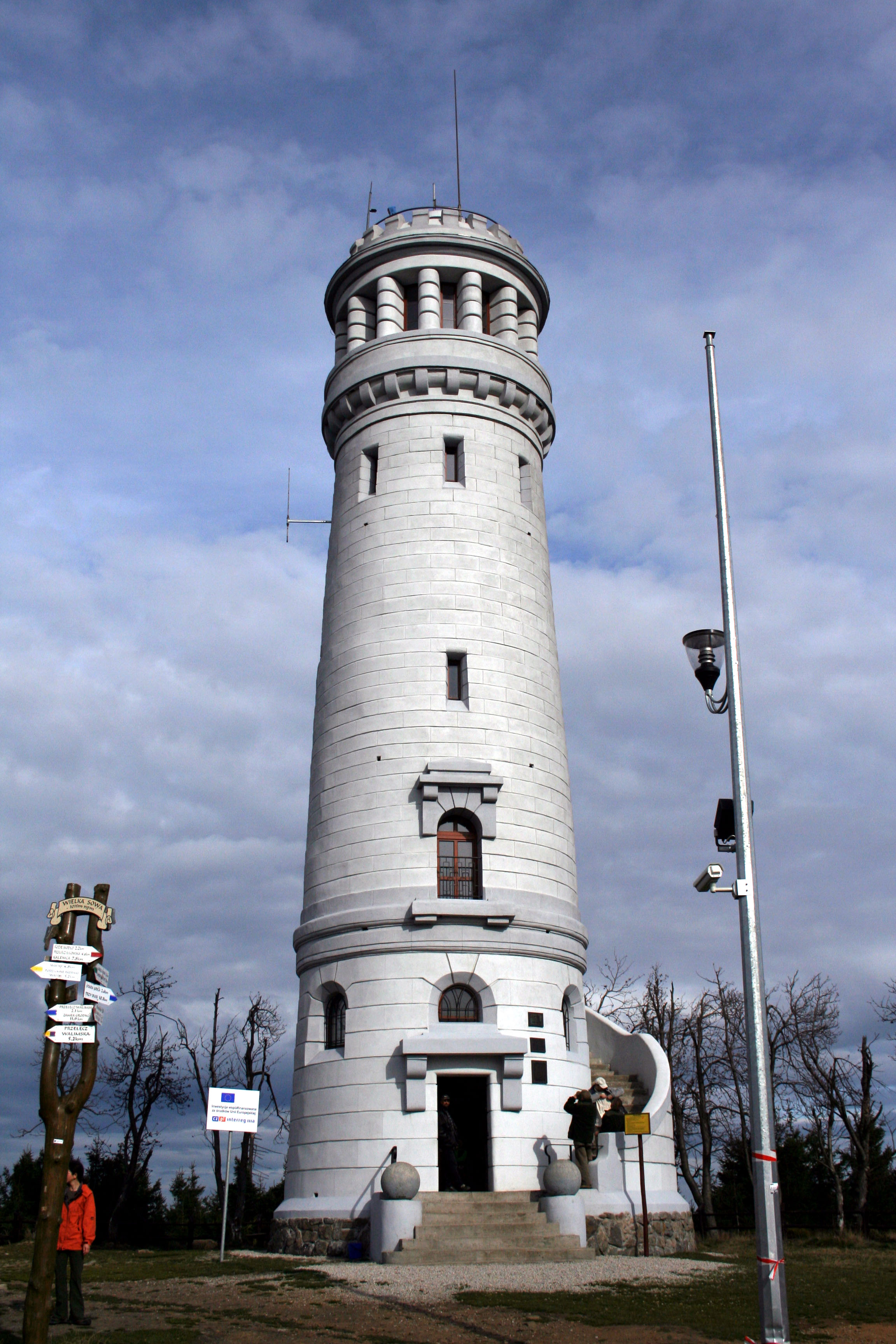 rozhledna na Velké Sově v Sovích horách